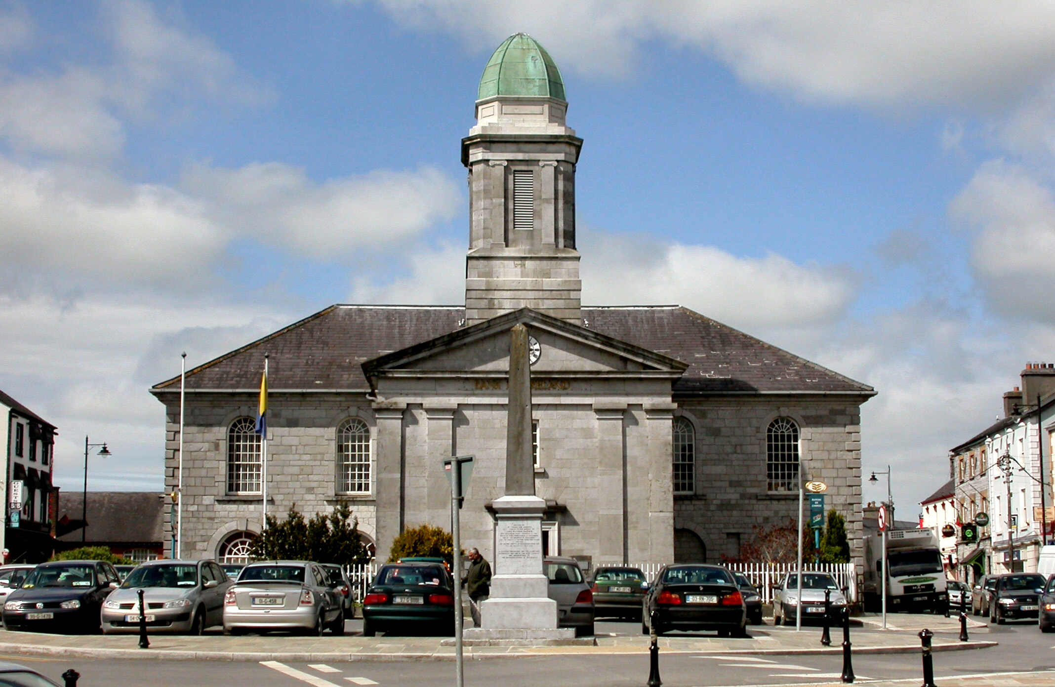 Halla Harrison, Ros Comáin.